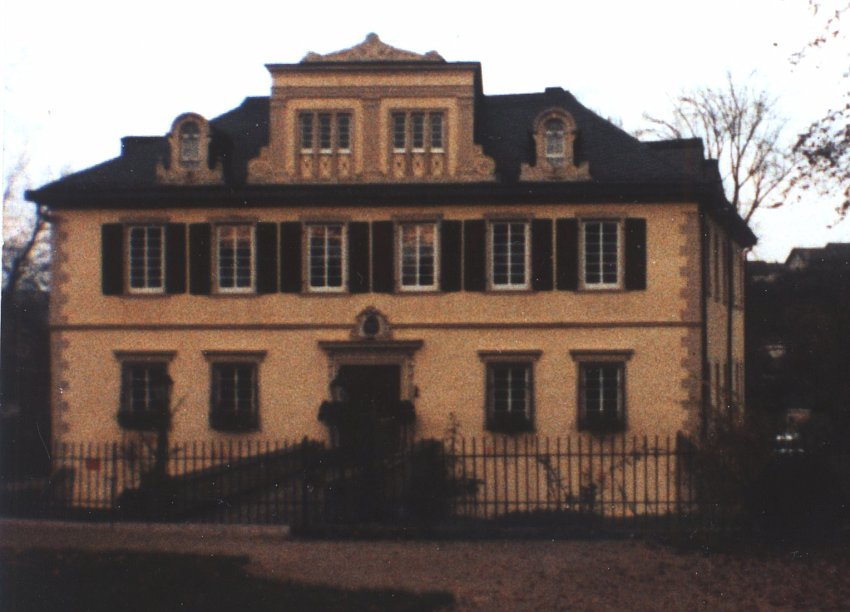 Schloss Michelfels, Hauptbau